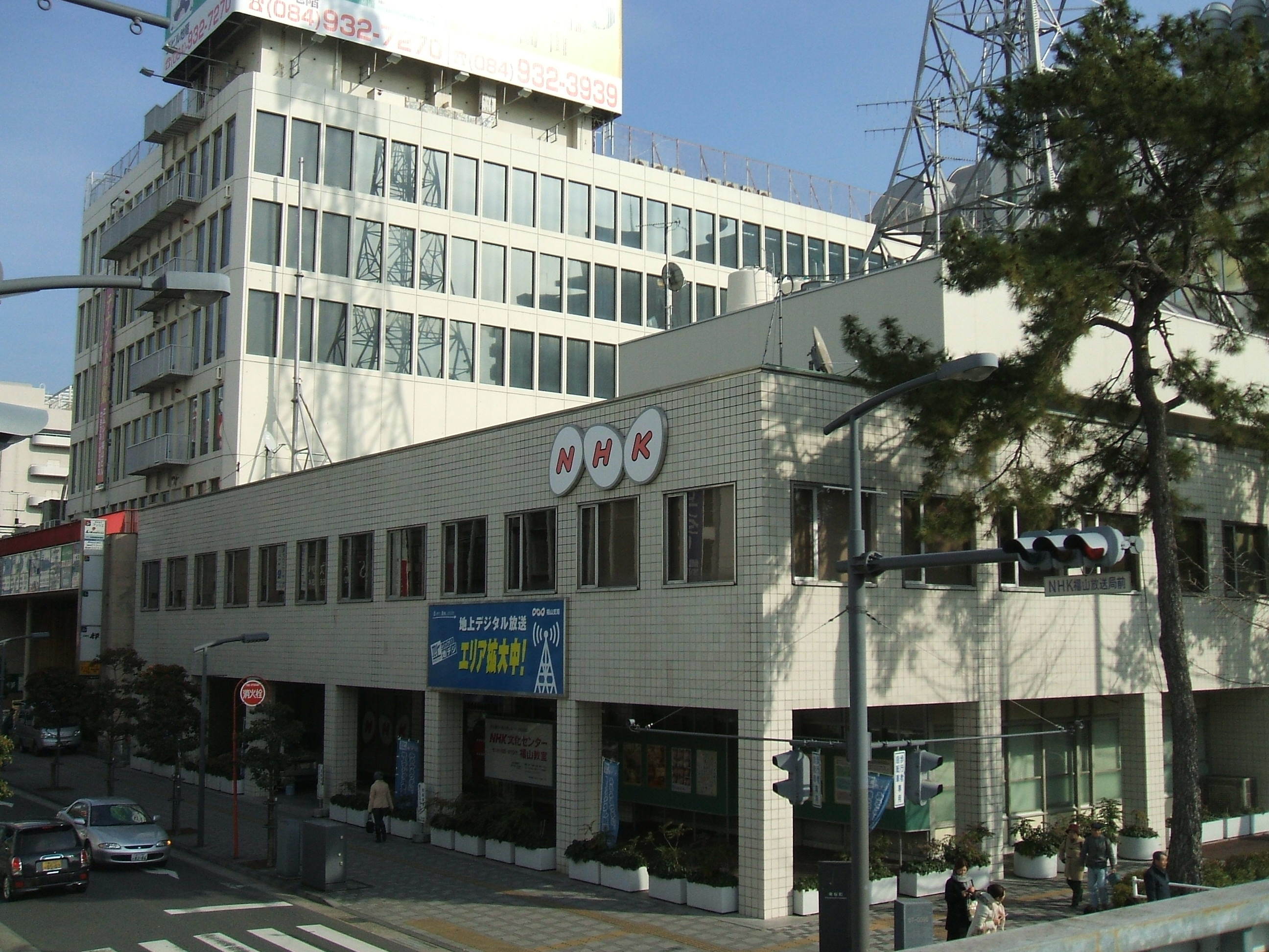 日本の広島県福山市にあるNHK福山放送支局のビル